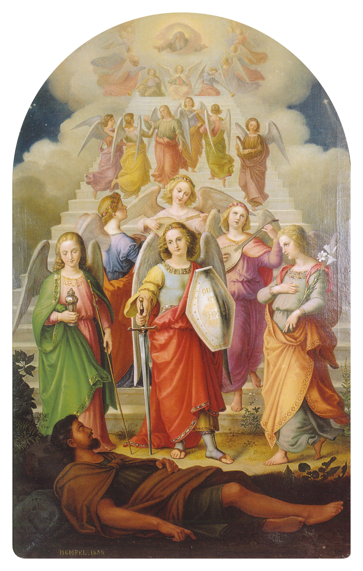 Jakobs Traum von der Himmelsleiter